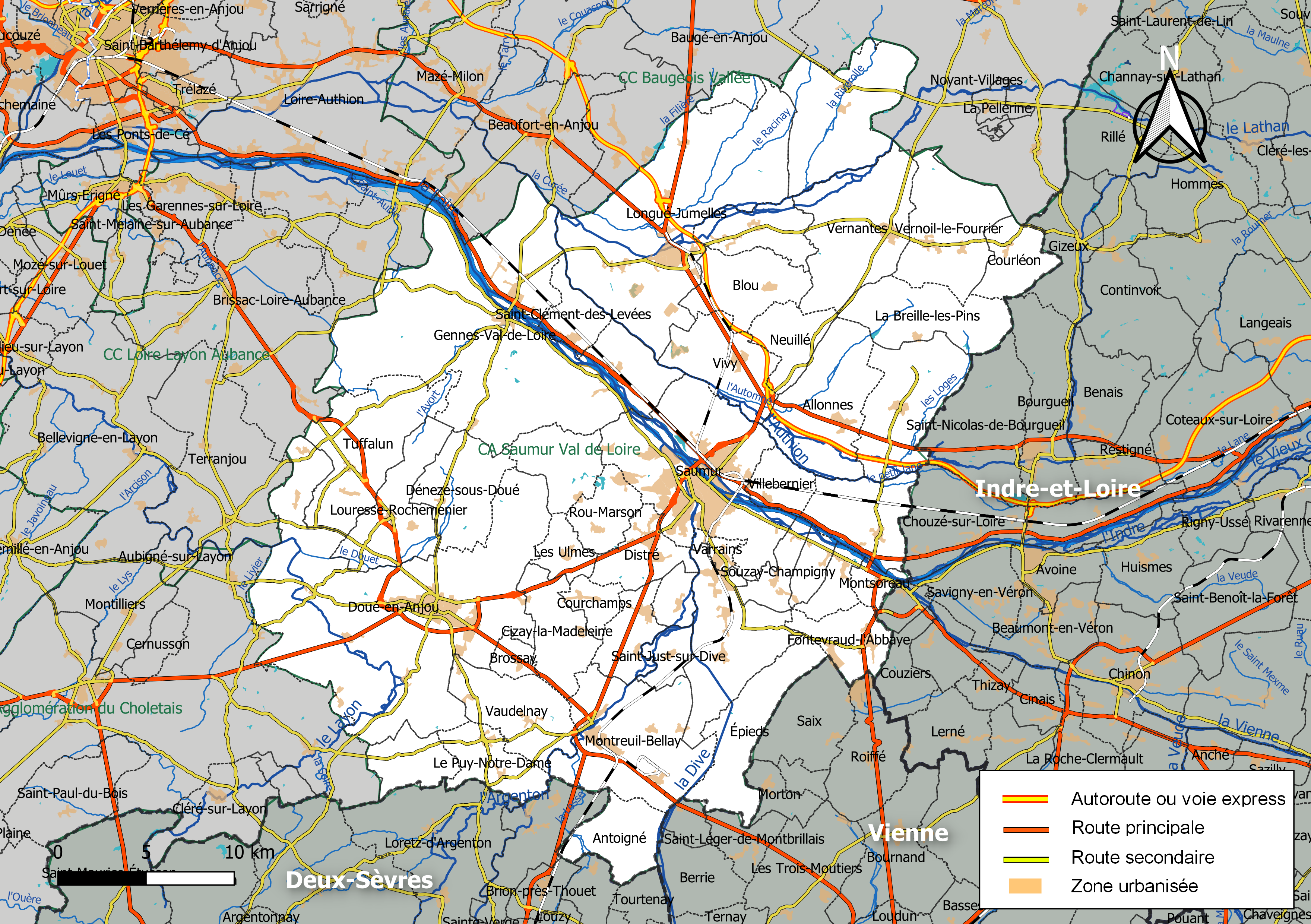 Carte géographique de la Communauté d'agglomération Saumur Val de Loire, département de Maine-et-Loire, France. Composition au 1er janvier 2019.